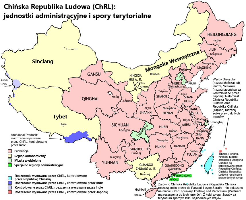 Ta mapa przedstawia podział administracyjny i tereny sporne Chińskiej Republiki Ludowej.